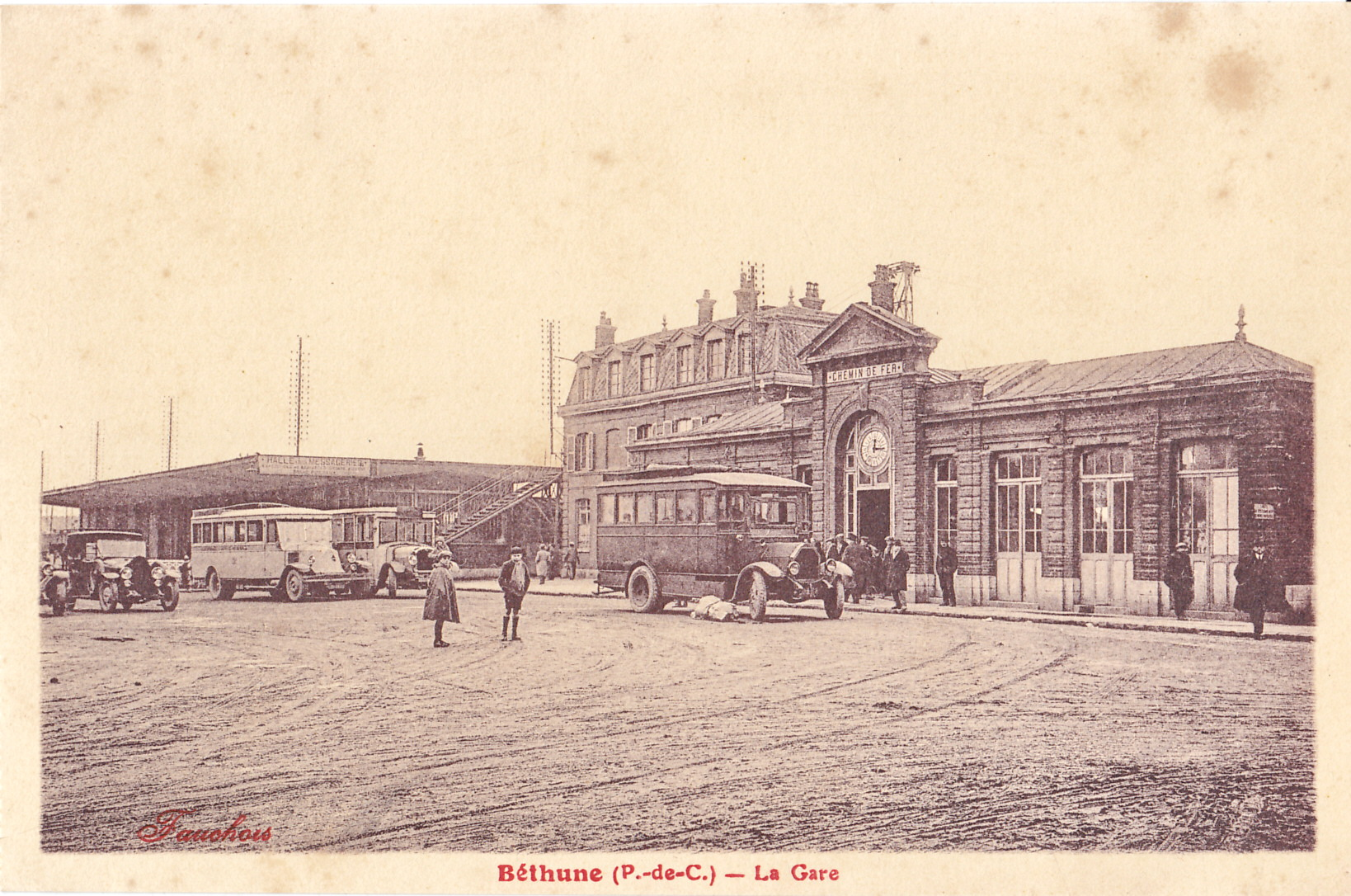 Carte postale semi-moderne éditée par Fauchois : BÉTHUNE - La Gare